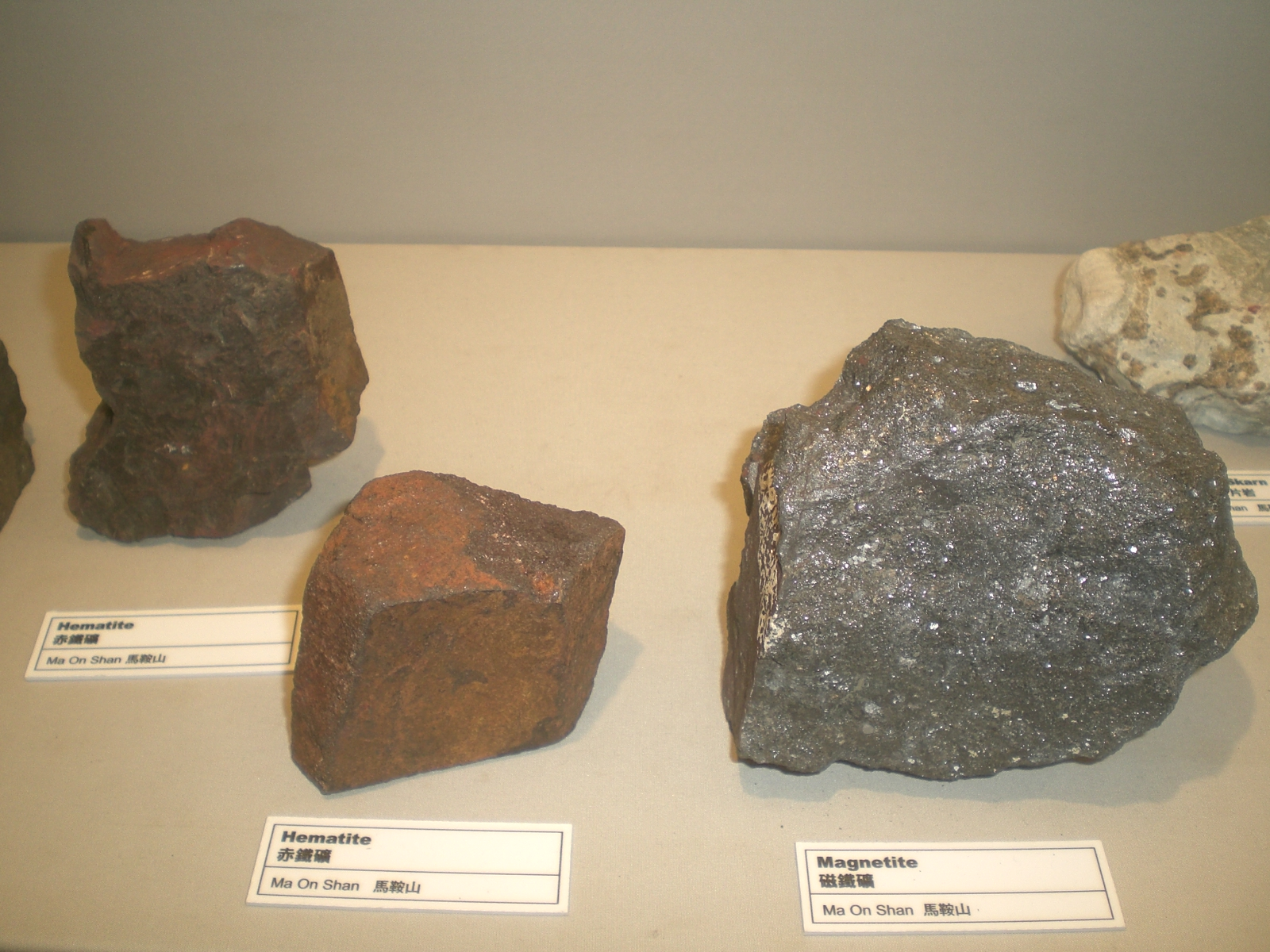 香港大學許士芬地質博物館